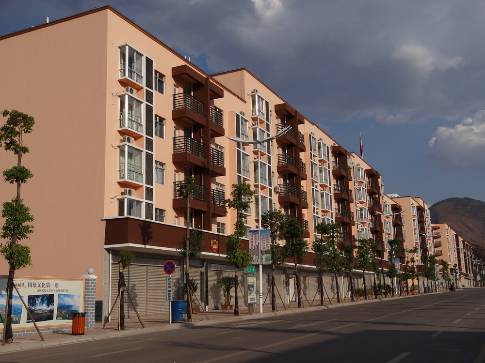 新城区廉租房